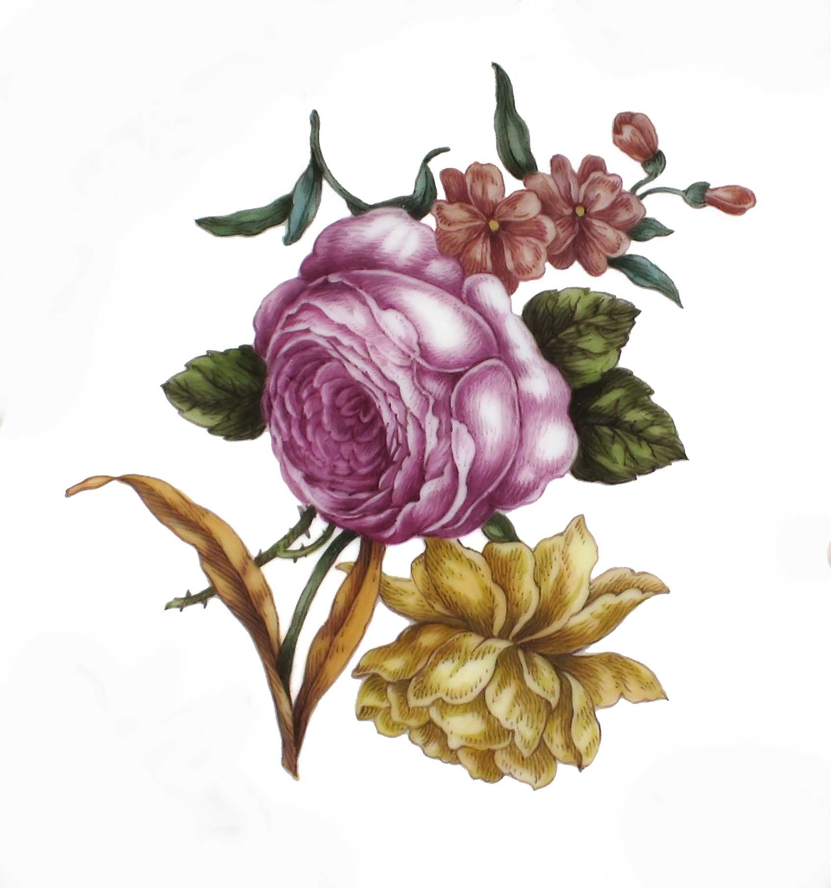 Porzellanmalerei, Holzschnittblume